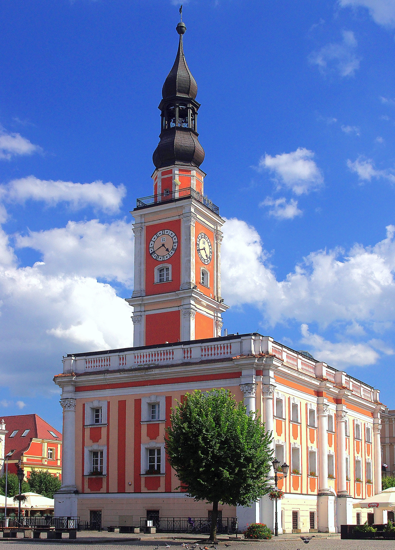 Ratusz stoi w centralnym punkcie Starego Rynku i jest jedną z najokazalszych budowli tego typu w Wielkopolsce